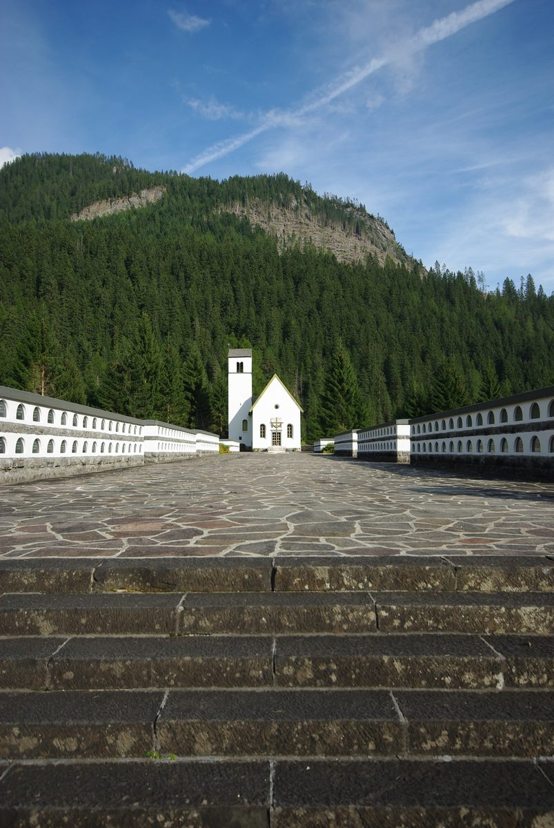 Soldatenfriedhof Pian di Salesei, Livinallongo del Col di Lana (BL)